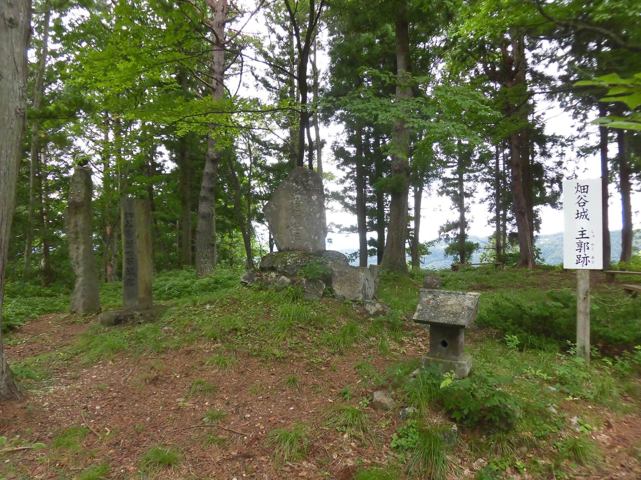 畑谷城。山形県東村山郡山辺町畑谷の館山。慶長5年（1600年）の慶長出羽合戦において戦場となった。中央は城主の江口光清の碑。